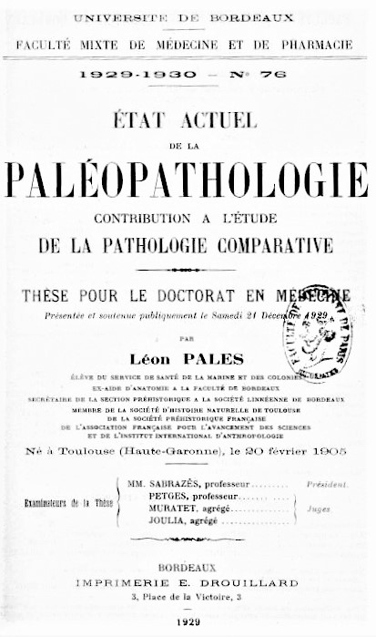 Couverture de la thèse de Léon Pales soutenue en 1929 à Bordeaux sur l'état de la paléopathologie